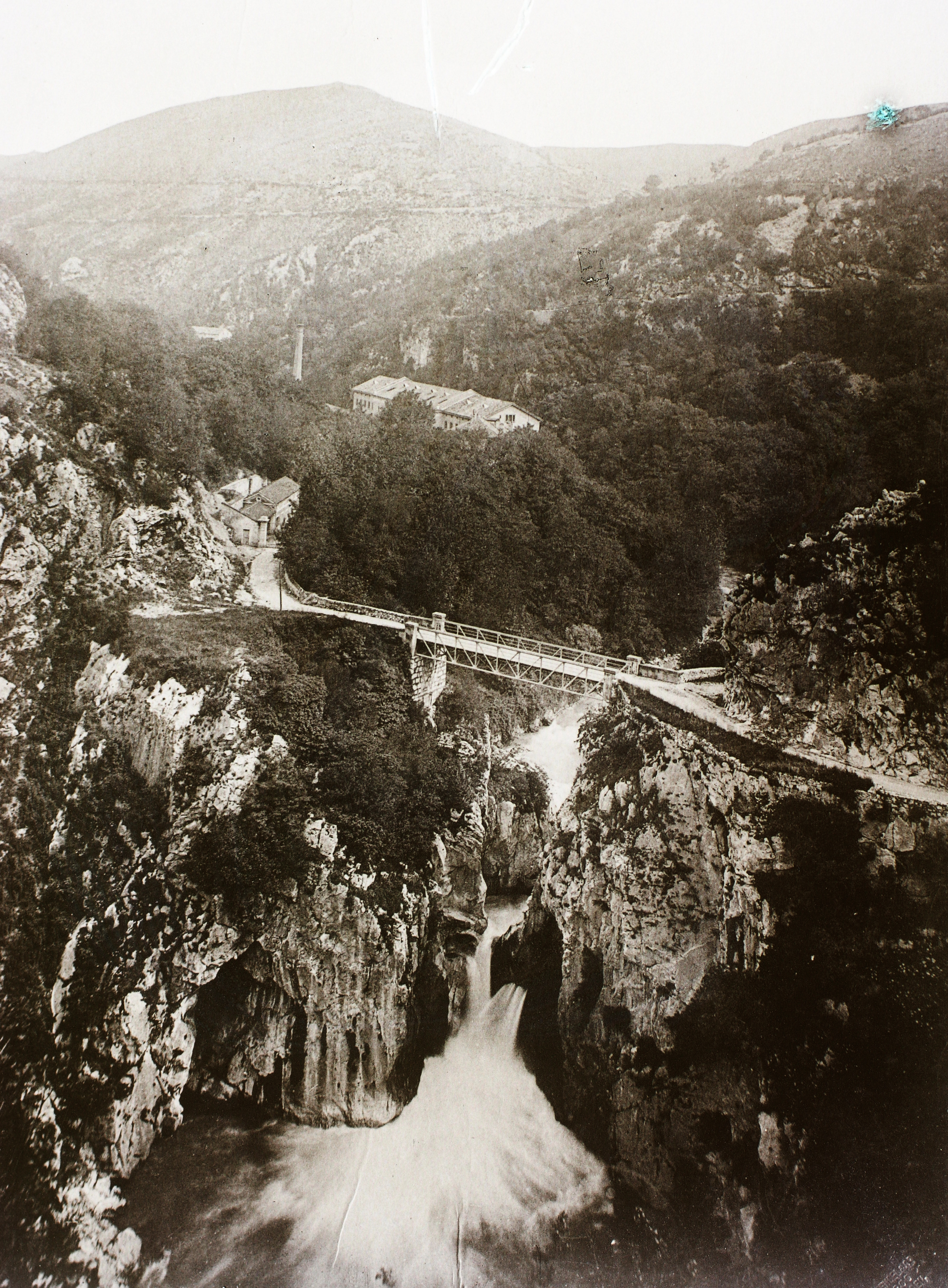 Orehovica (ma a város része), híd a Recsina folyó völgye felett. Location: Croatia, Rijeka Tags: bridge Title: Orehovica (ma a város része), híd a Recsina folyó völgye felett.